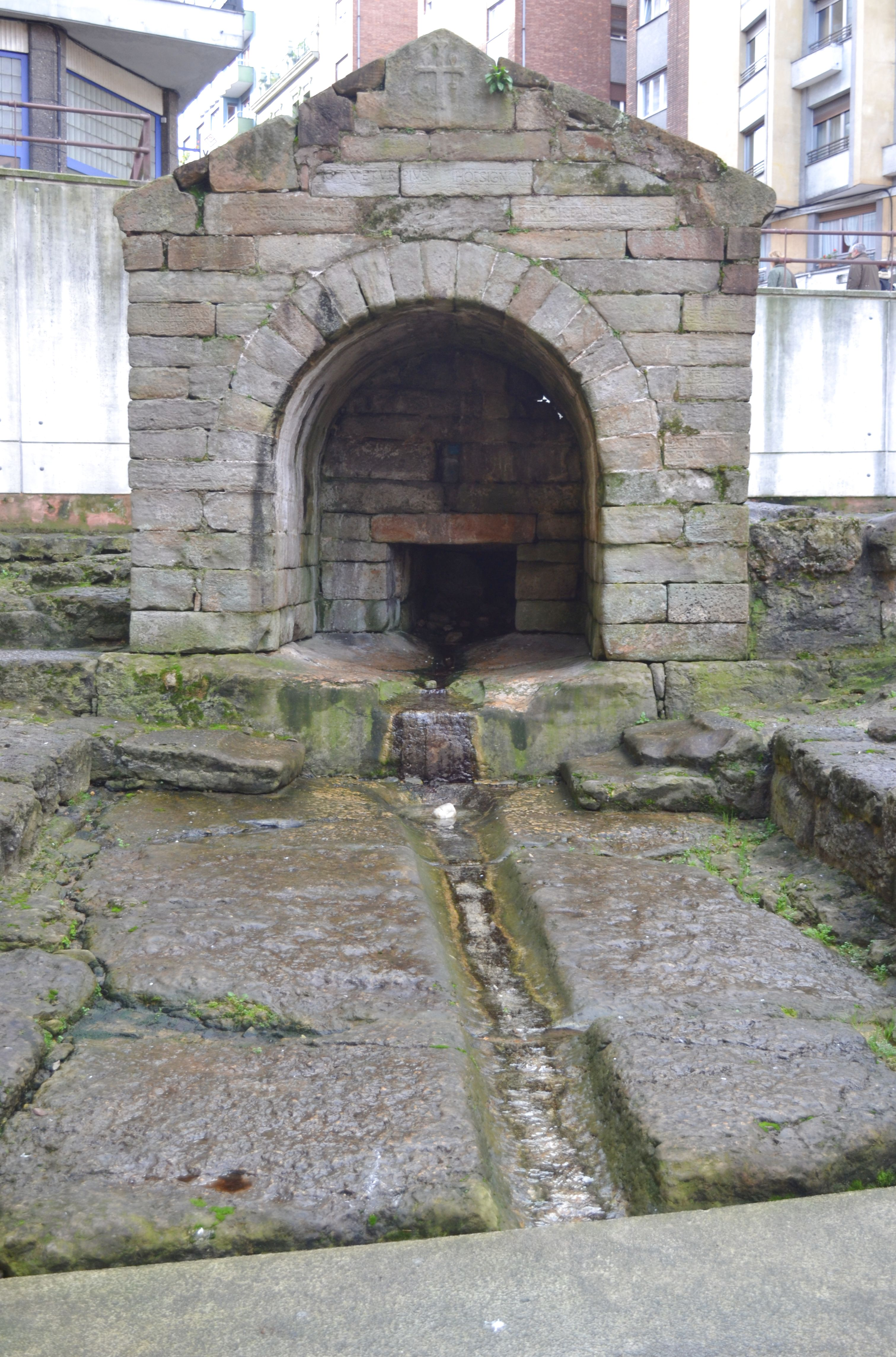 Vista Frontal.